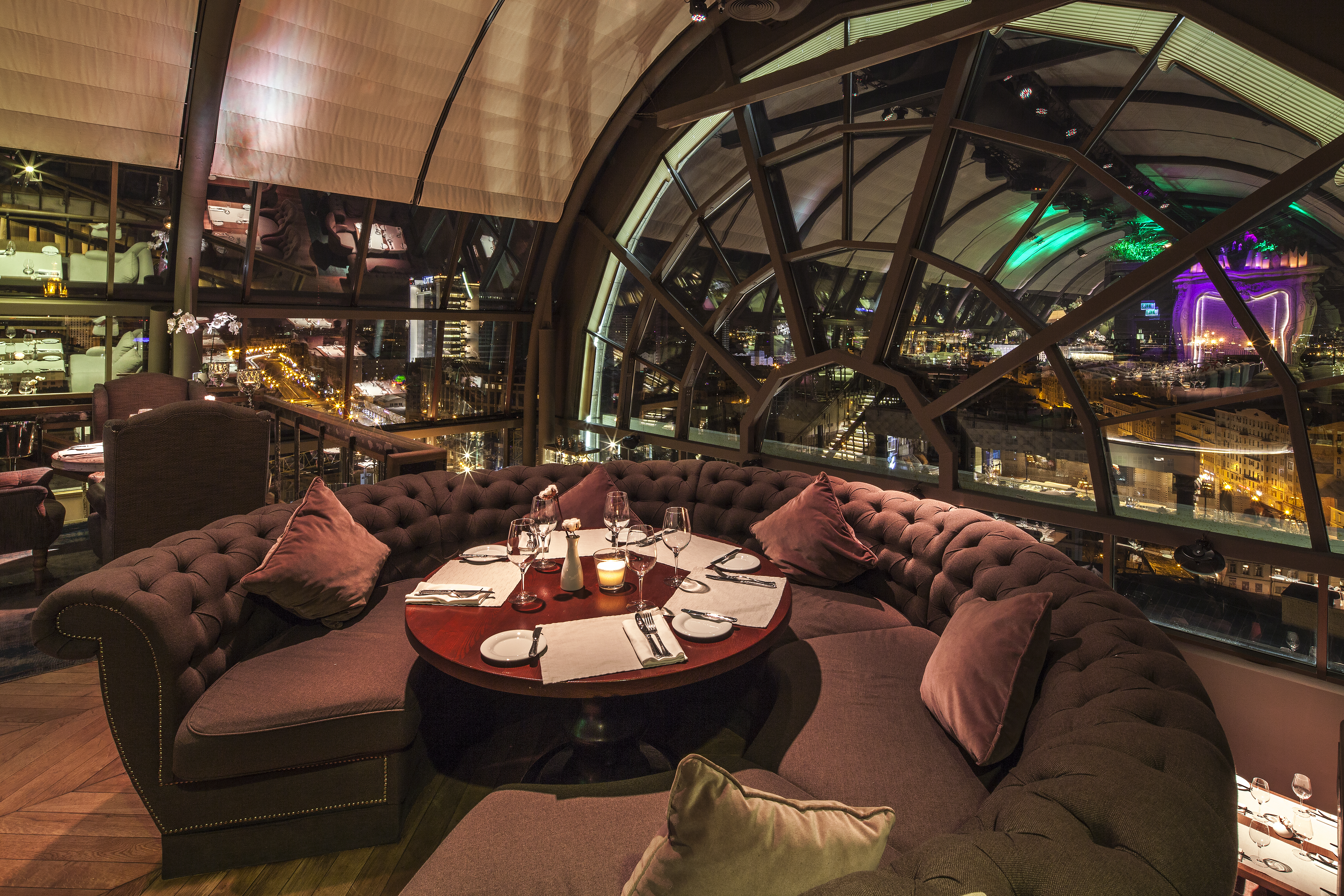 Интерьер ресторана White Rabbit